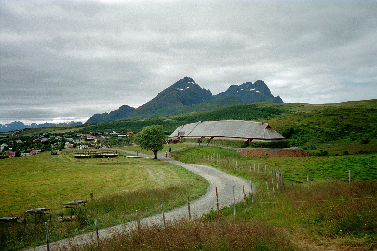 Høvdinghuset Borg i Lofoten